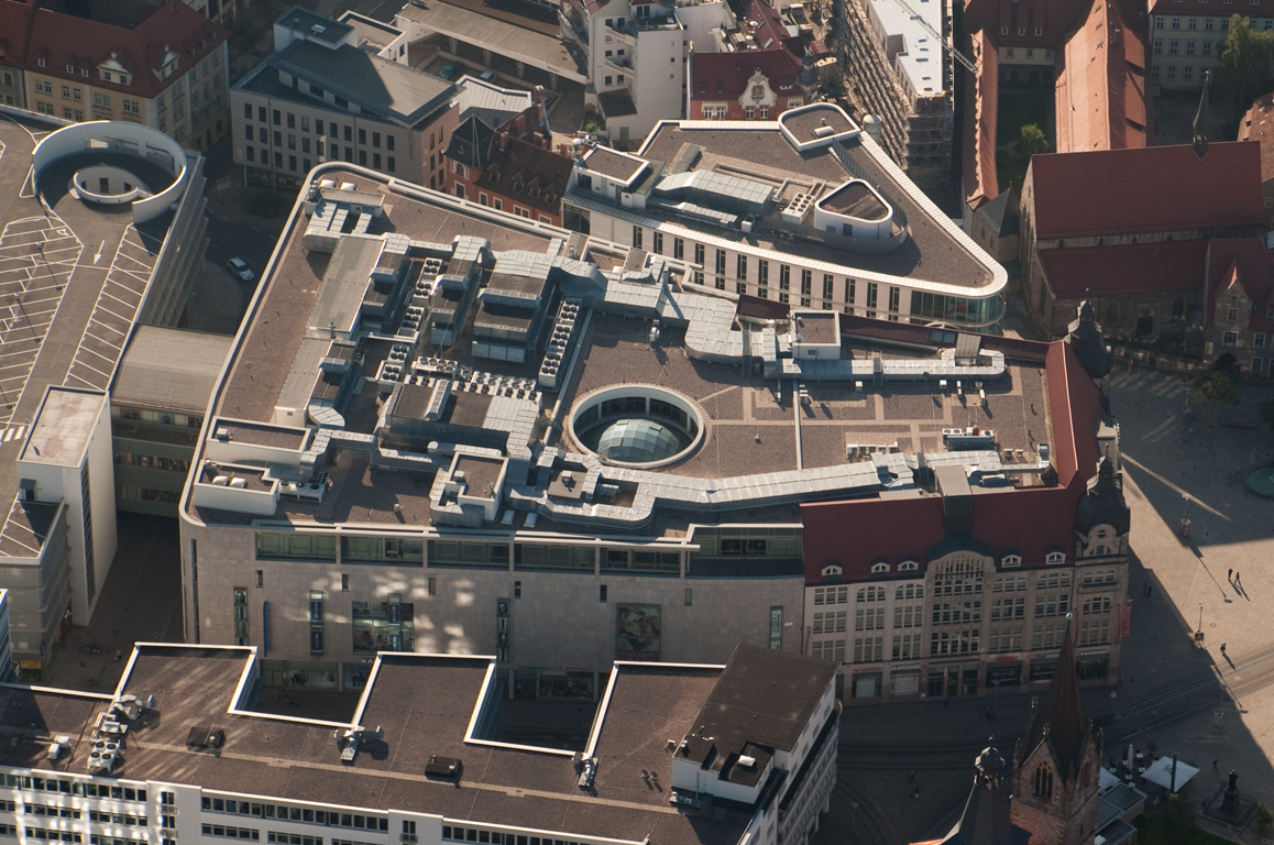 Einkaufszentrum Anger 1, am Anger in Erfurt